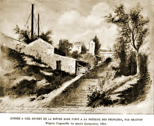 Poterne des peupliers